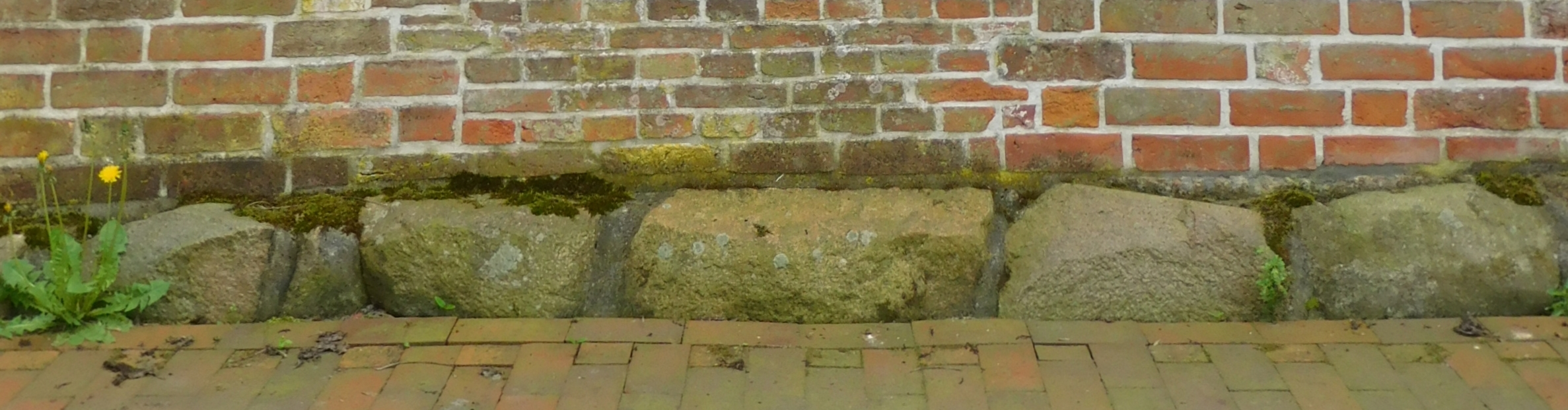 Quaderfindlingsfundament der evangelisch-lutherischen Kirche Wüppels